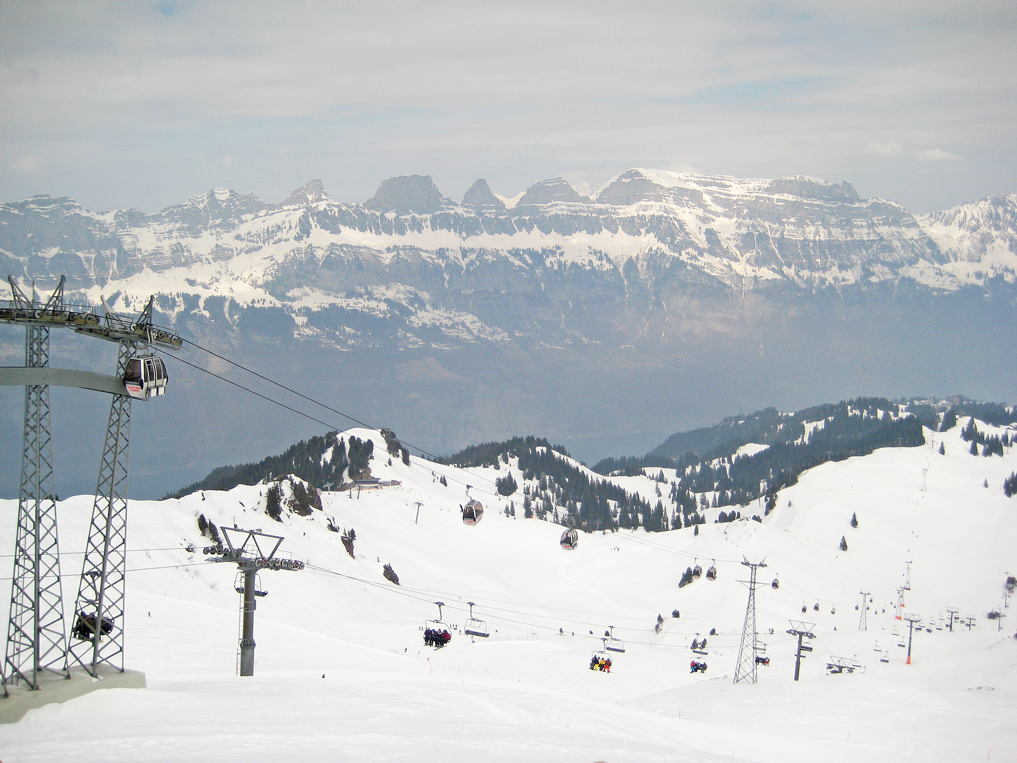 Skigebiet Flumserberg vom Maschgenkamm. Churfirsten im Hintergrund